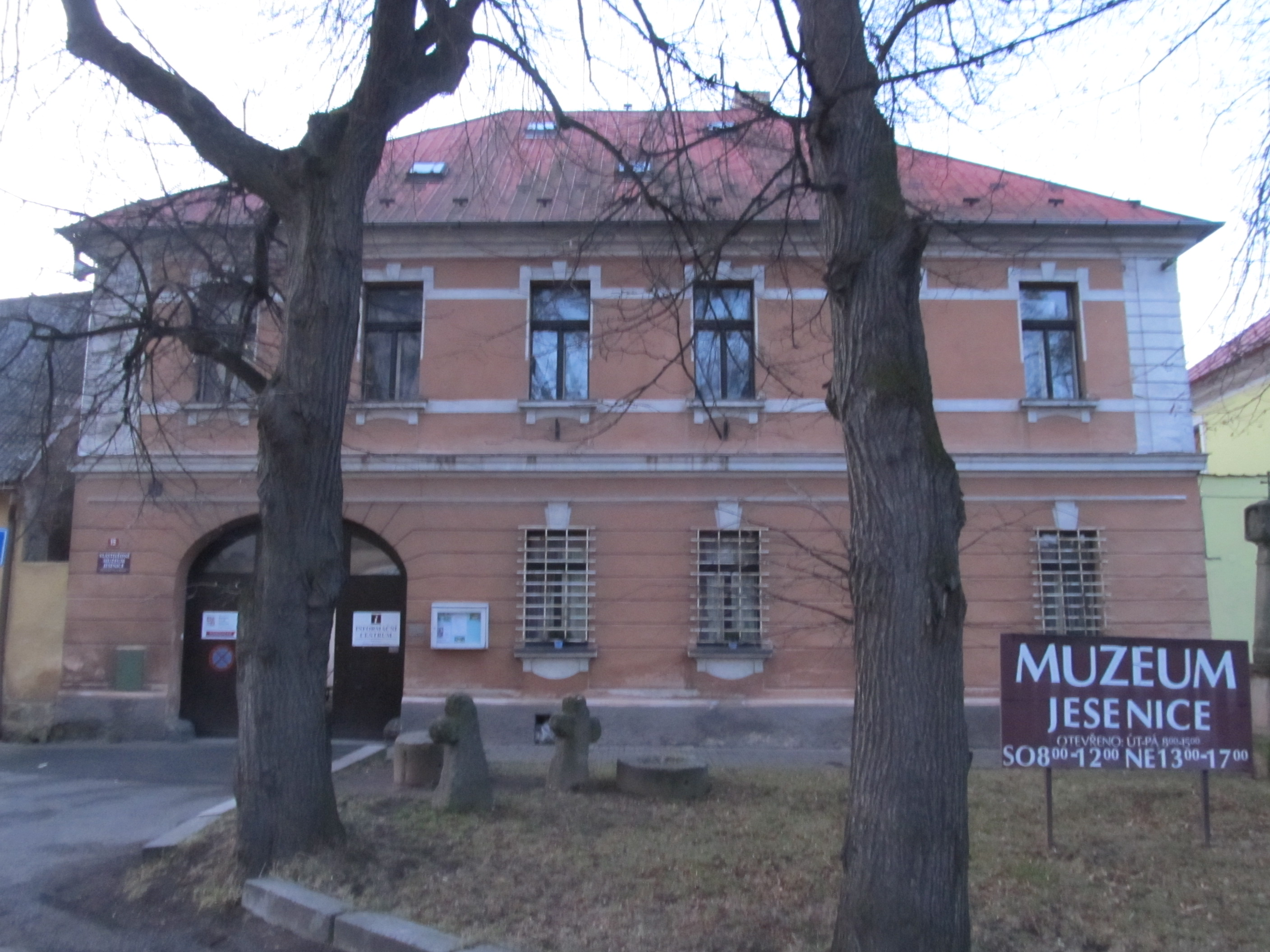 Jesenice - muzeum